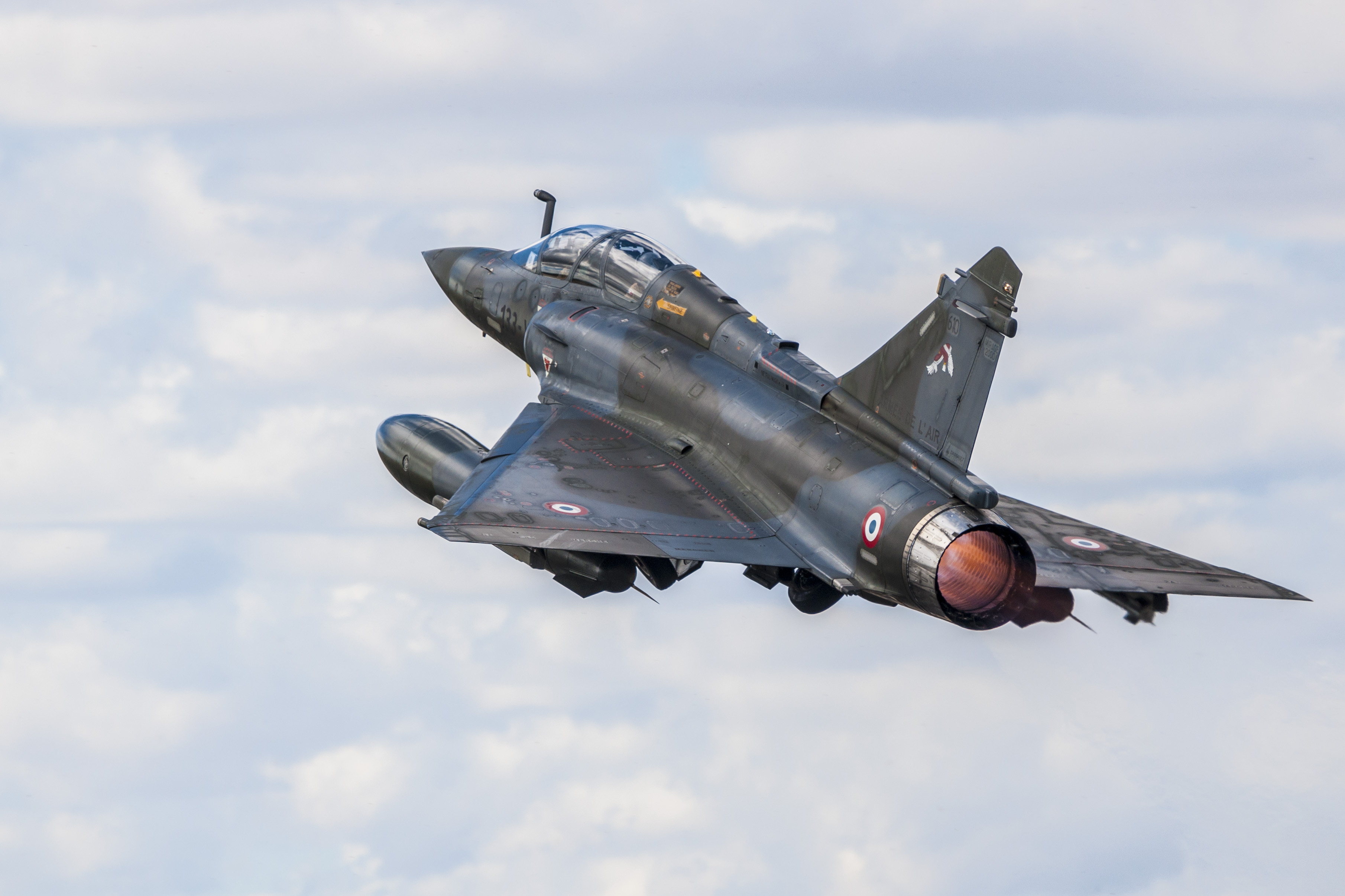 Fotos tomadas durante la primera jornada del TPL2013-5 SpottingDay